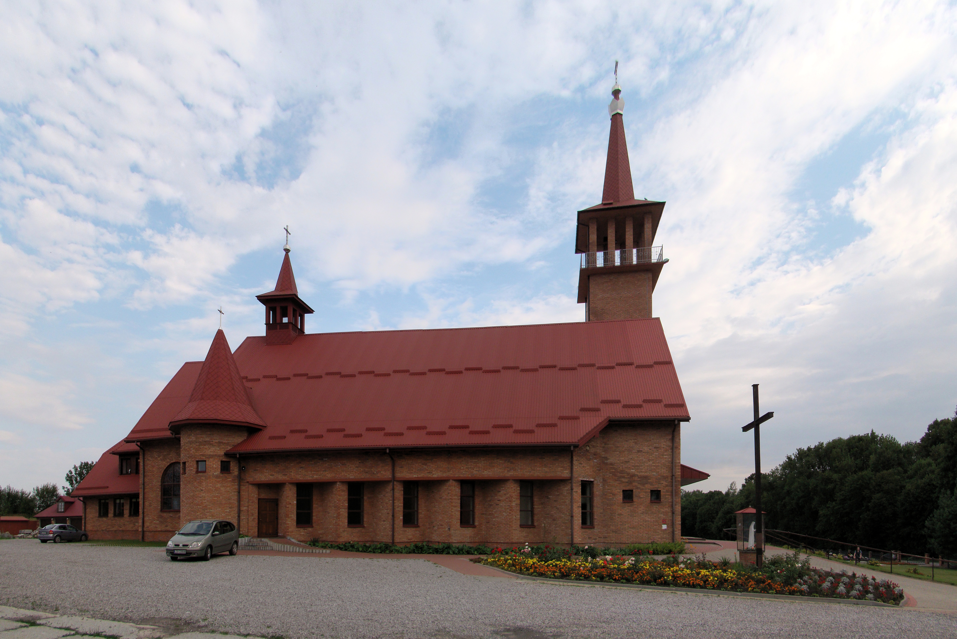 Kostel sv. srdce ve vesnici Bodaczów, Polsko